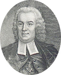 Georg (Göran/Jöran) Klas/Clas Schröder (1714-1773)